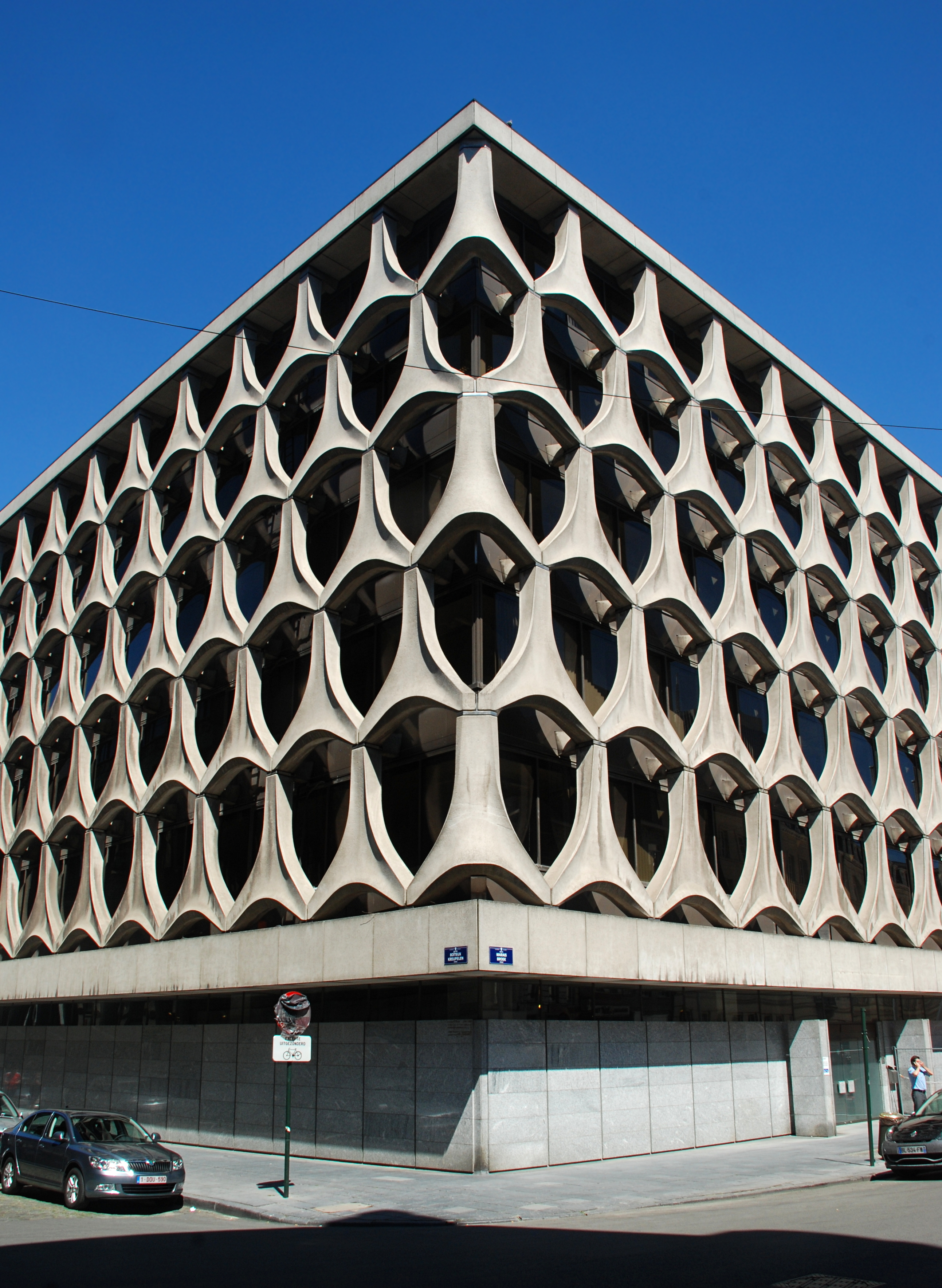 Belgique - Bruxelles - CGER - Bâtiment Marais (architecture fonctionnalise - architectes Marcel Lambrichs, C. Grochowski et D. de Laveleye - 1969-1973)